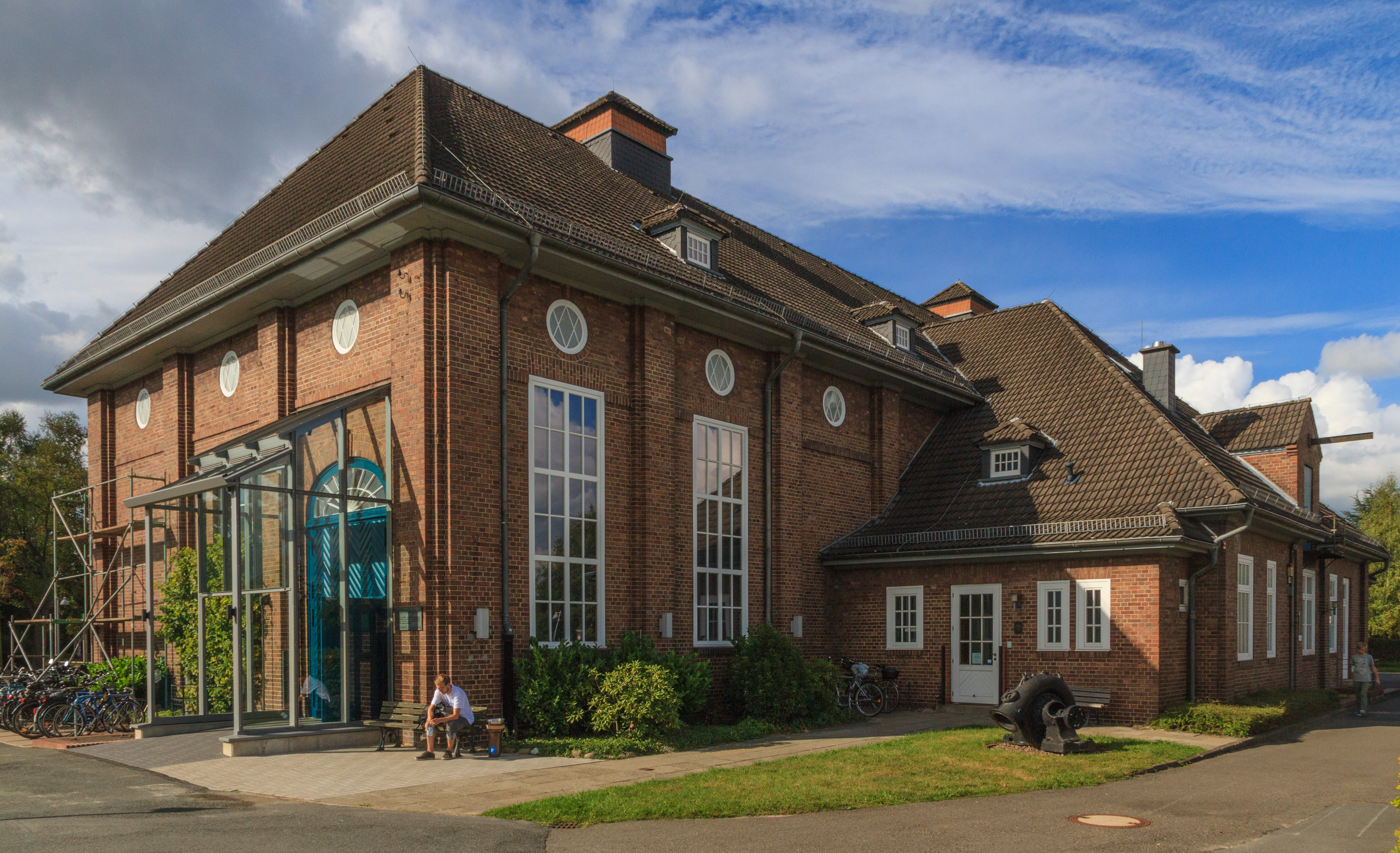 Hauptpumpwerk I in Bremen, Bayernstraße 121Die Denkmalgruppe ist ein geschütztes Kulturdenkmal in der Freien Hansestadt Bremen, mit der Nr. 0103 beim Landesamt für Denkmalpflege registriert.